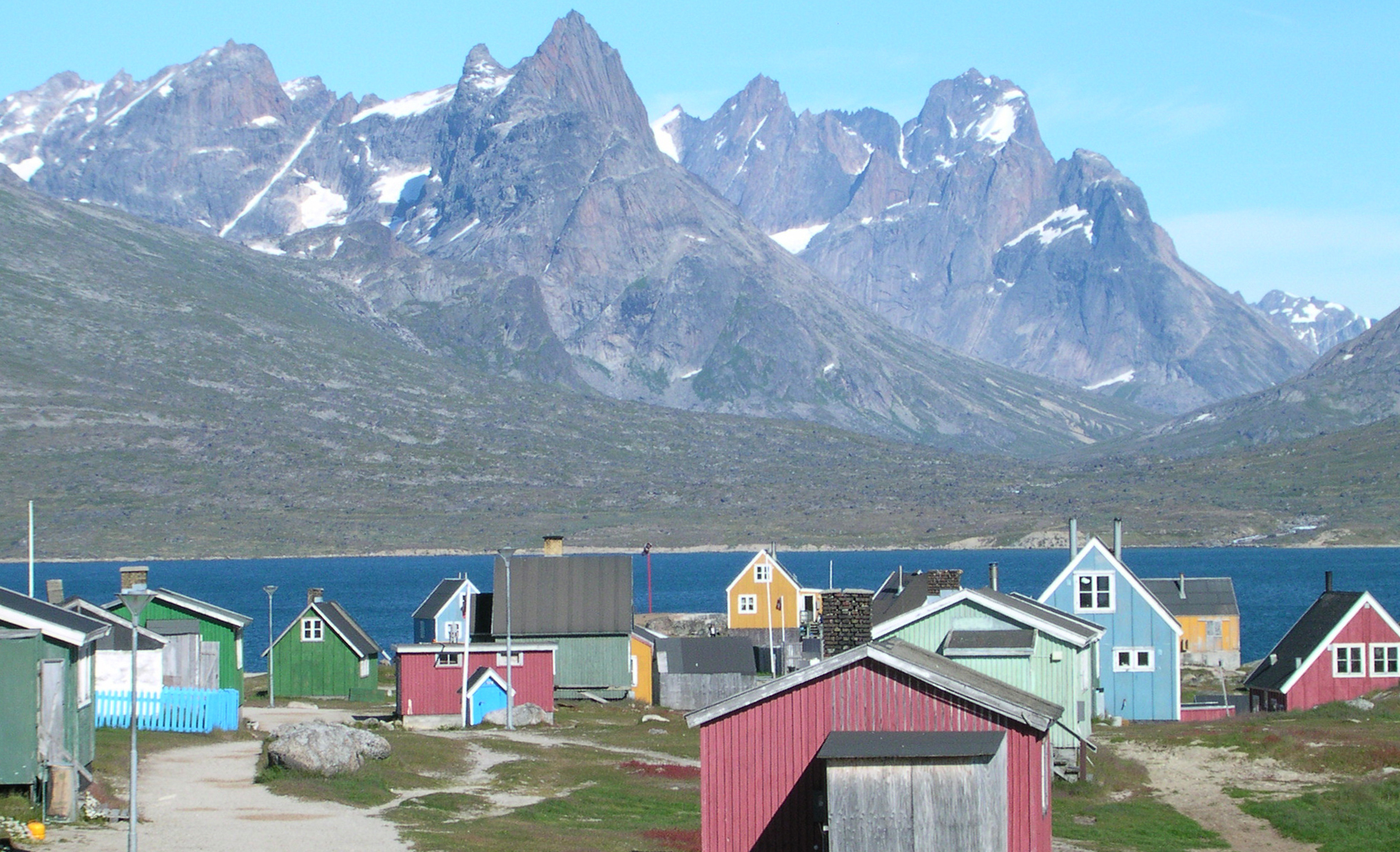 Tasiusaq